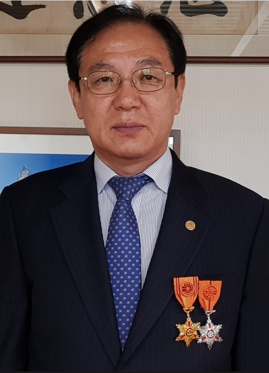 녹조근정훈장과 근정포장을 패용한 사진